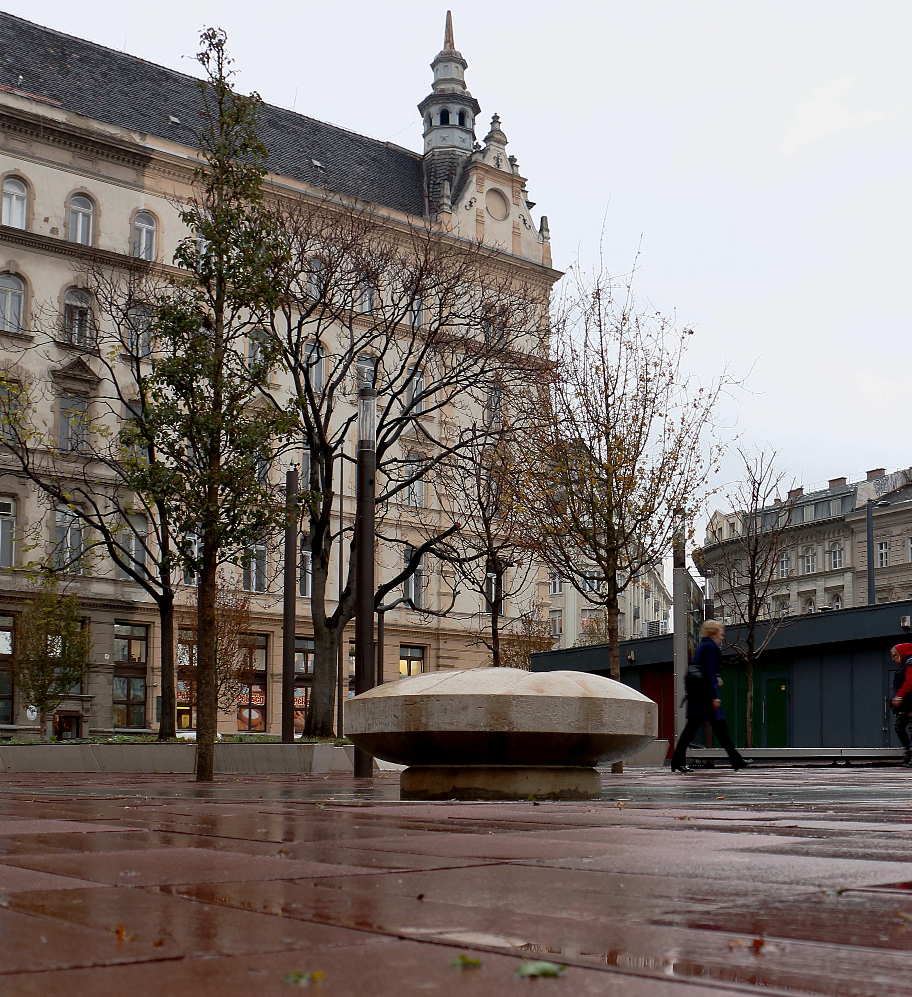 Bányai József 1983-ban felállított csobogója a Podmaniczky téren